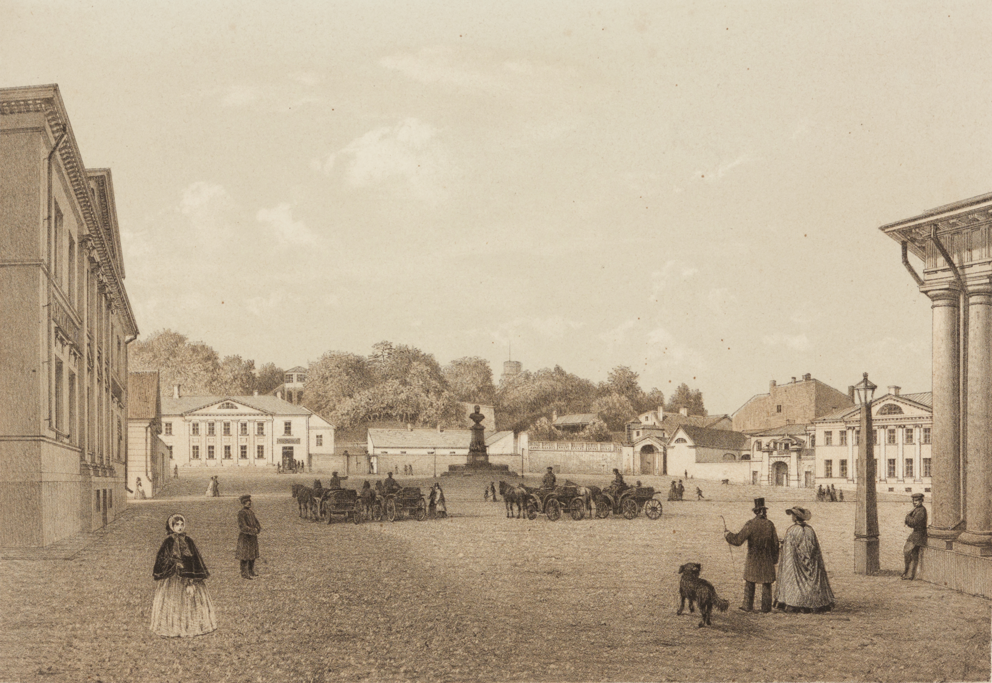 Tartu album. Barclay plats. MUIS: TKM TR 4038 H 31:17